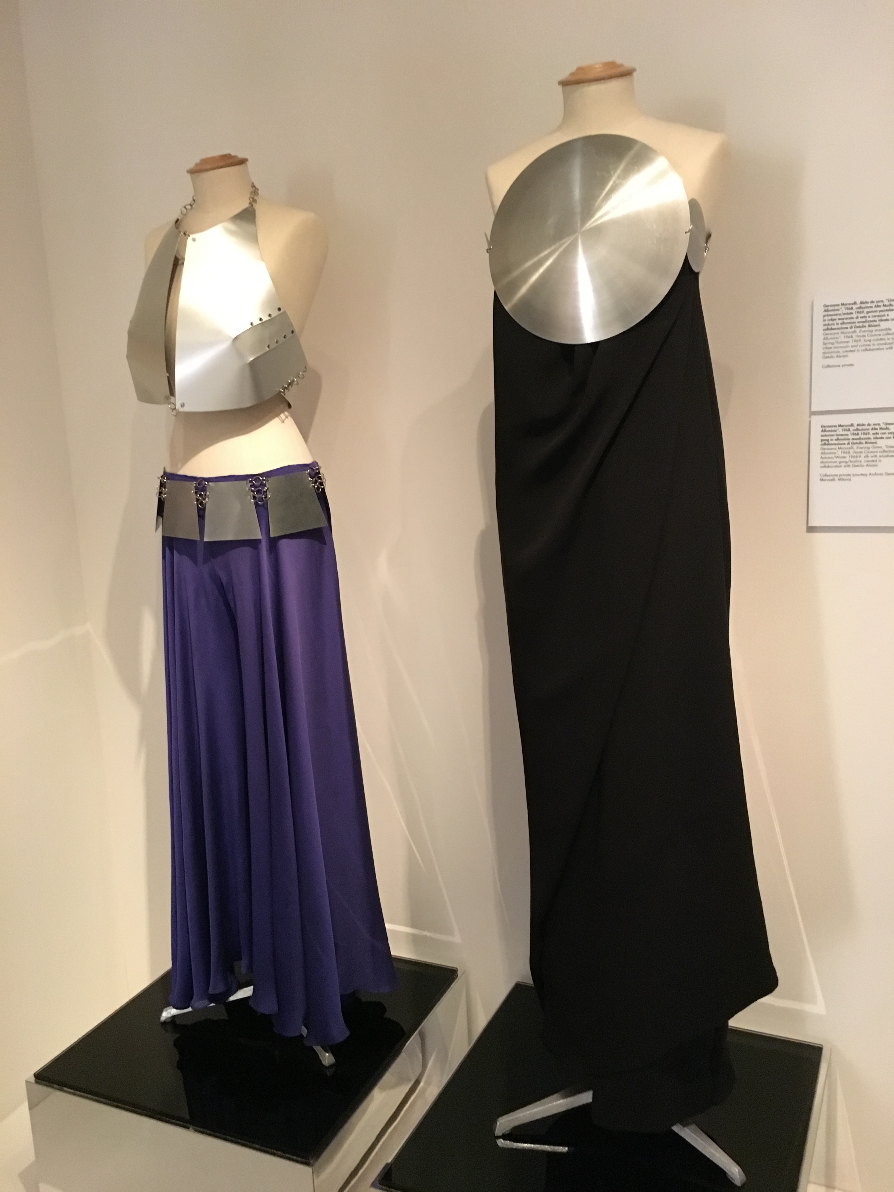 Germana Marucelli Linea Alluminio1968